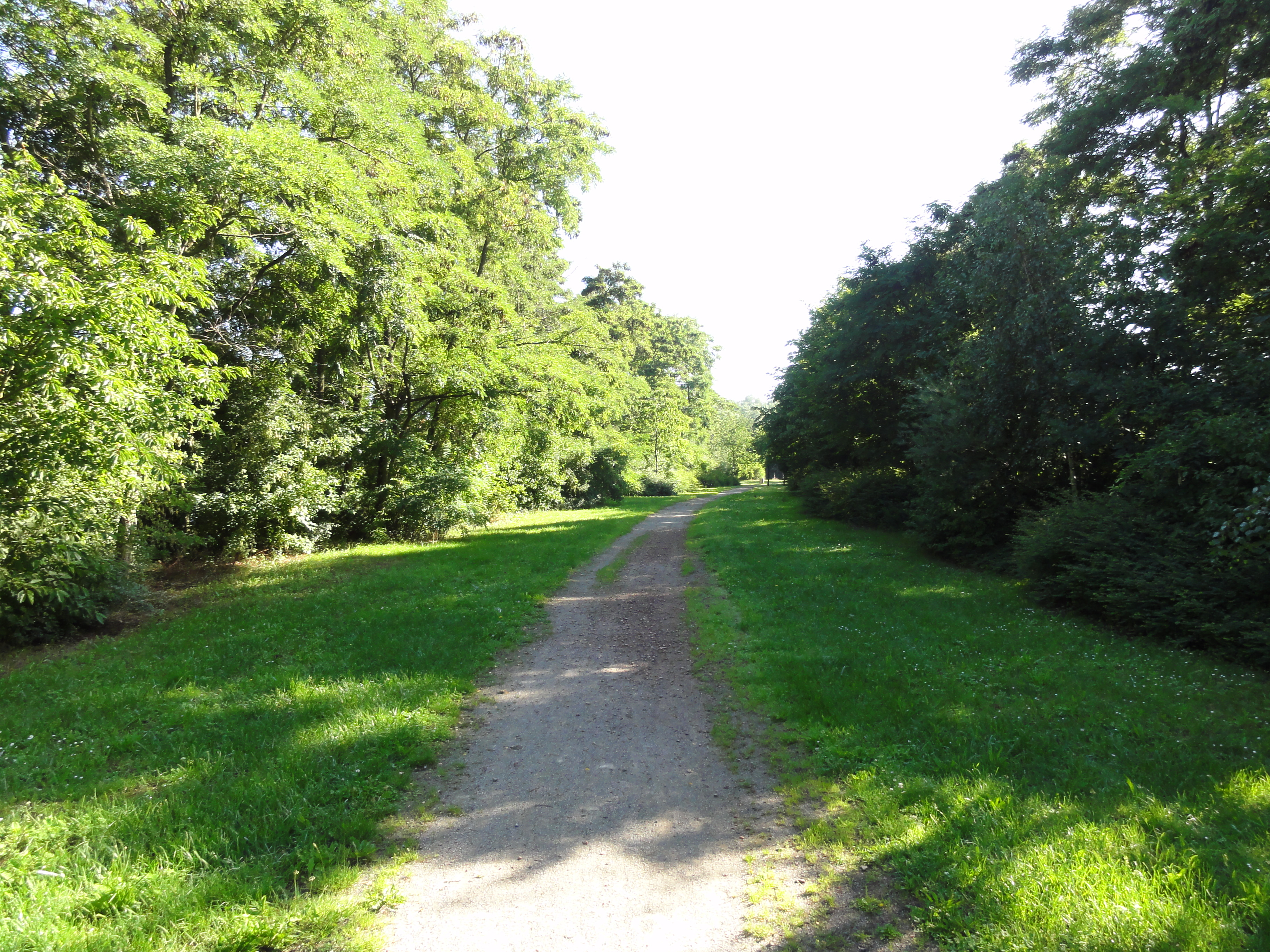 Terril n° 212 dit Cavalier du 10 de l'Escarpelle, Fosse n° 10 de la Compagnie des mines de l'Escarpelle, Leforest, Pas-de-Calais, Nord-Pas-de-Calais, France.